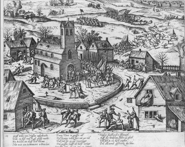 Slag bij Boksum in 1586. Deze afbeelding is in bezit van Tresoar te Leeuwarden. Vermoedelijk komt de afbeelding uit de zestiende eeuw. Het auteursrecht is verlopen.